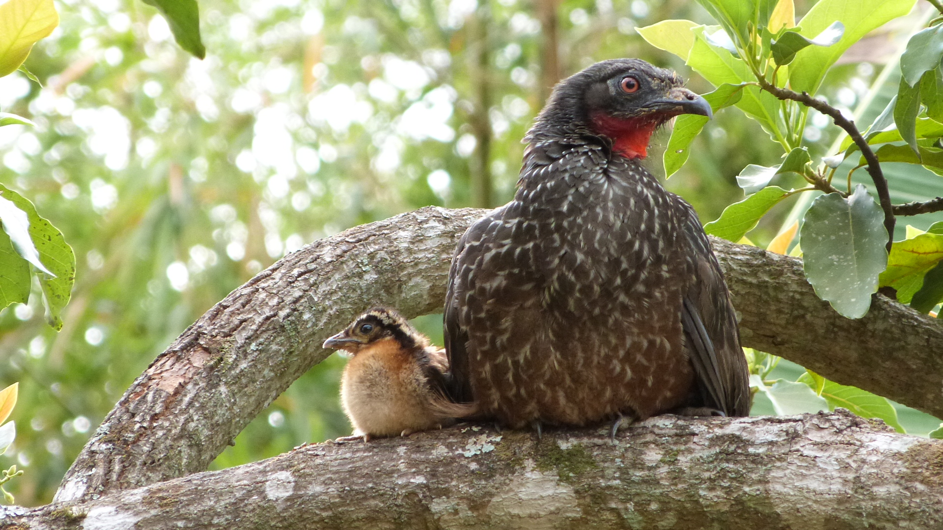 Foto tirada em Entre Rios - MG